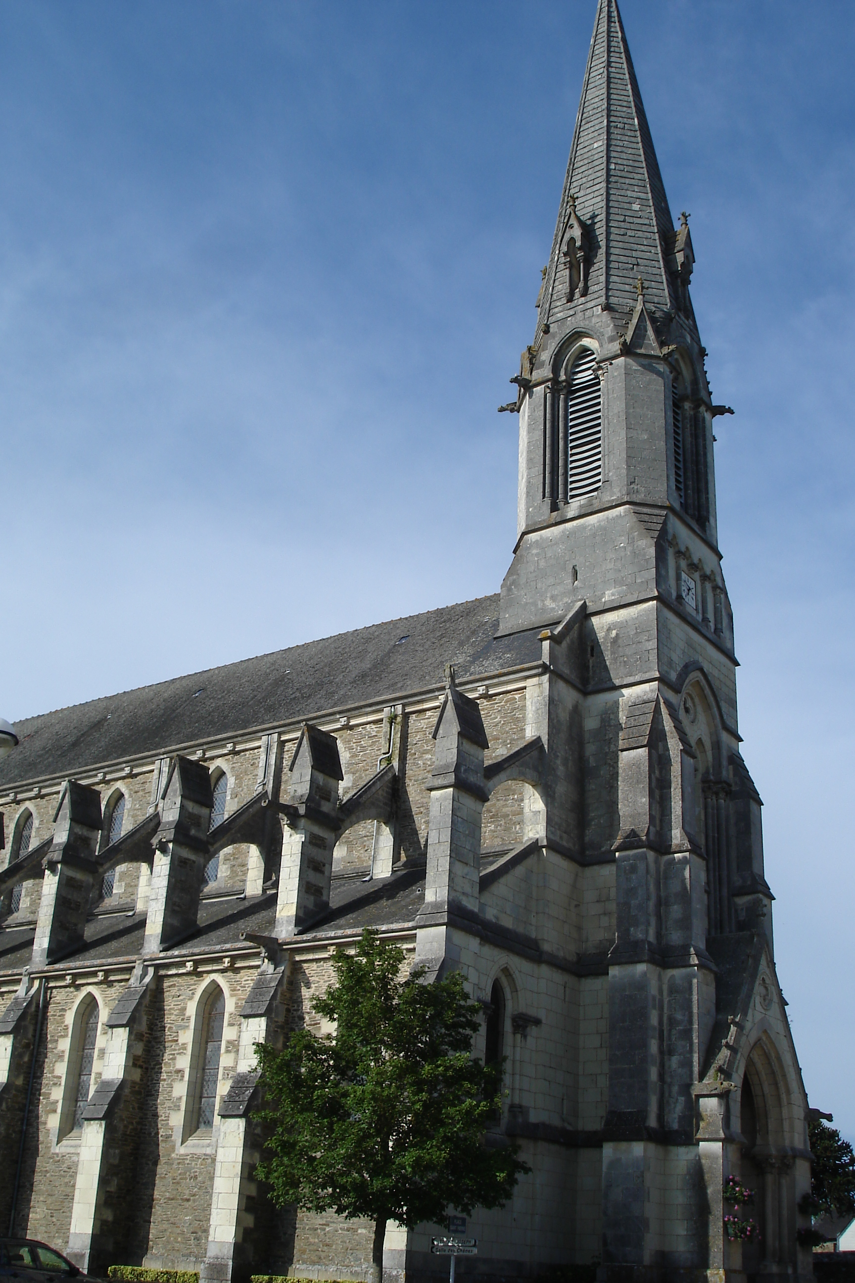 Photo représentant l'église de Couffé ville se situant en Loire-Atlantique (France)